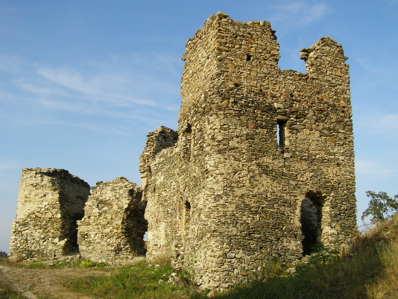 Nejzachovalejší část hradu Brníčko - zbytky budov